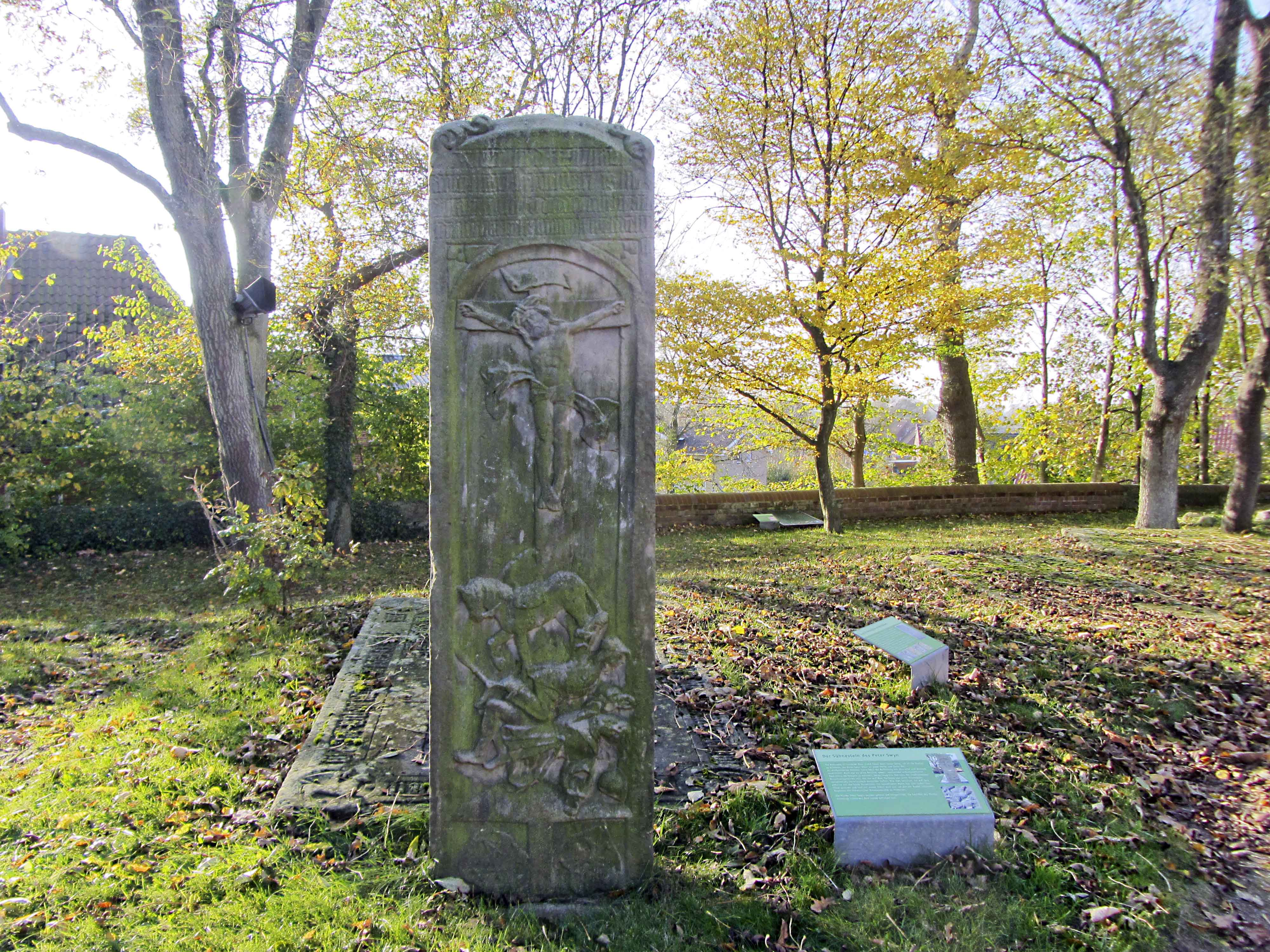 Sühnestein des Peter Swyn auf dem Lundener Geschlechterfriedhof.